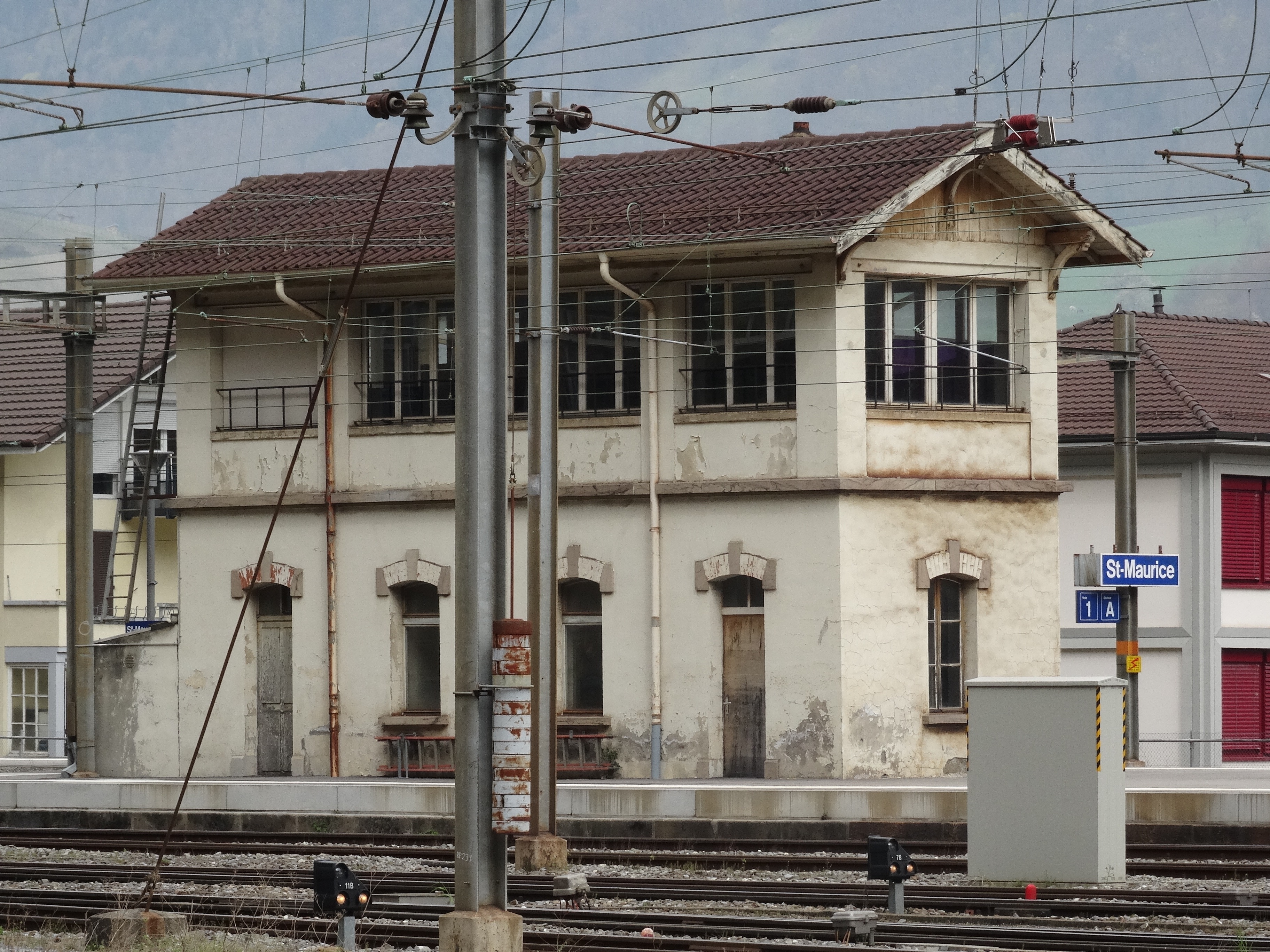 Le poste d'aiguillages actuellement inutilisé de la gare de St-Maurice après le tunnel.